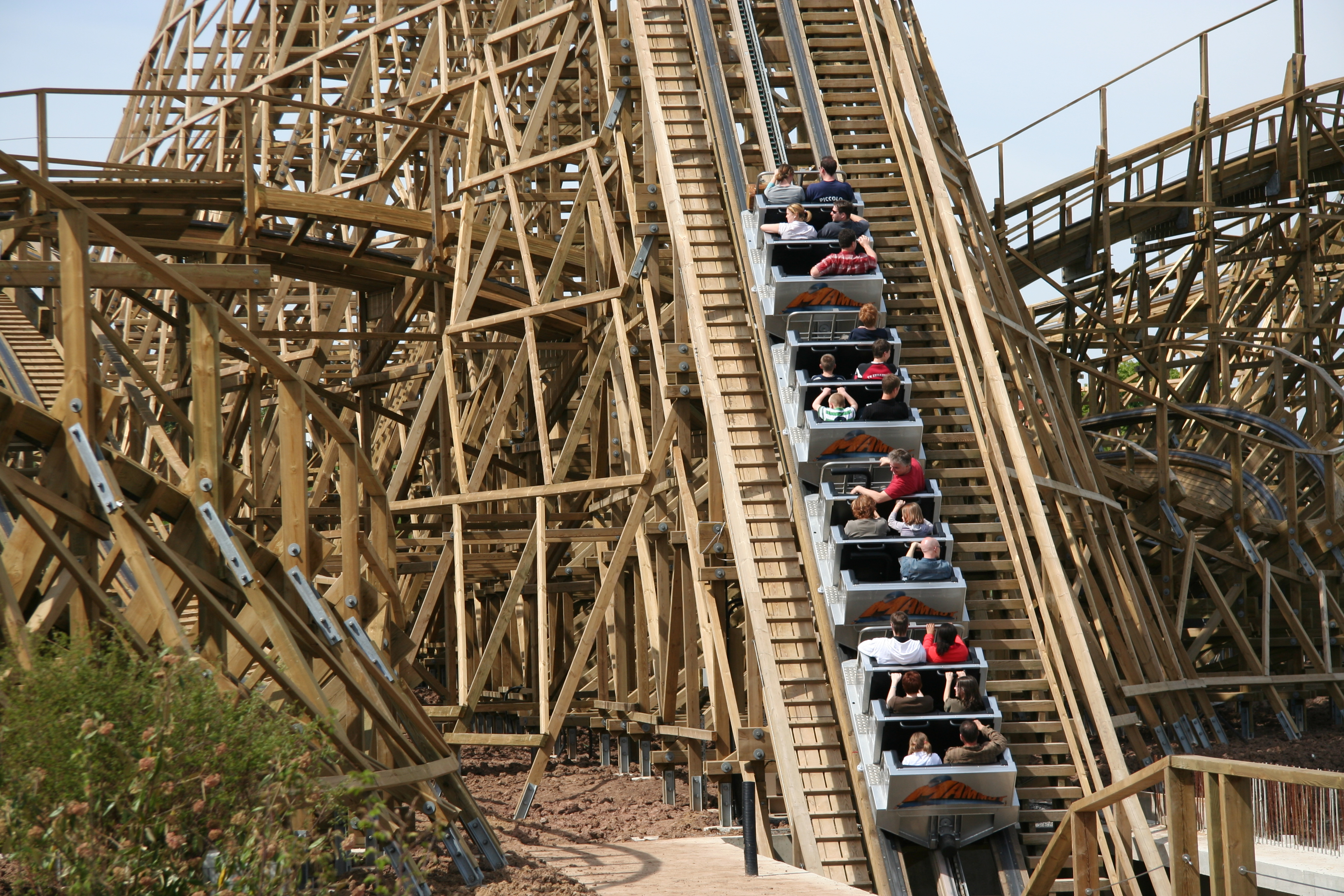 Gerstlauer Holzachterbahn (Mammut - Erlebnispark Tripsdrill)